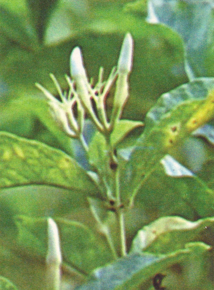 Udupi Mallige (Jasmine)